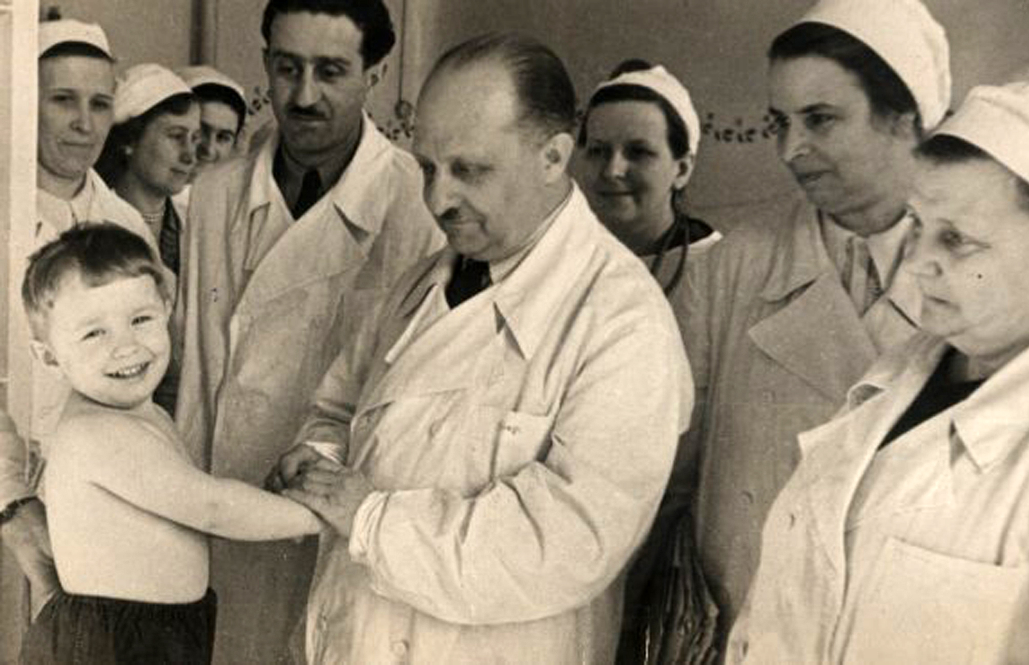 Профессорский обход в клинике госпитальной педиатрии ЛПМИ